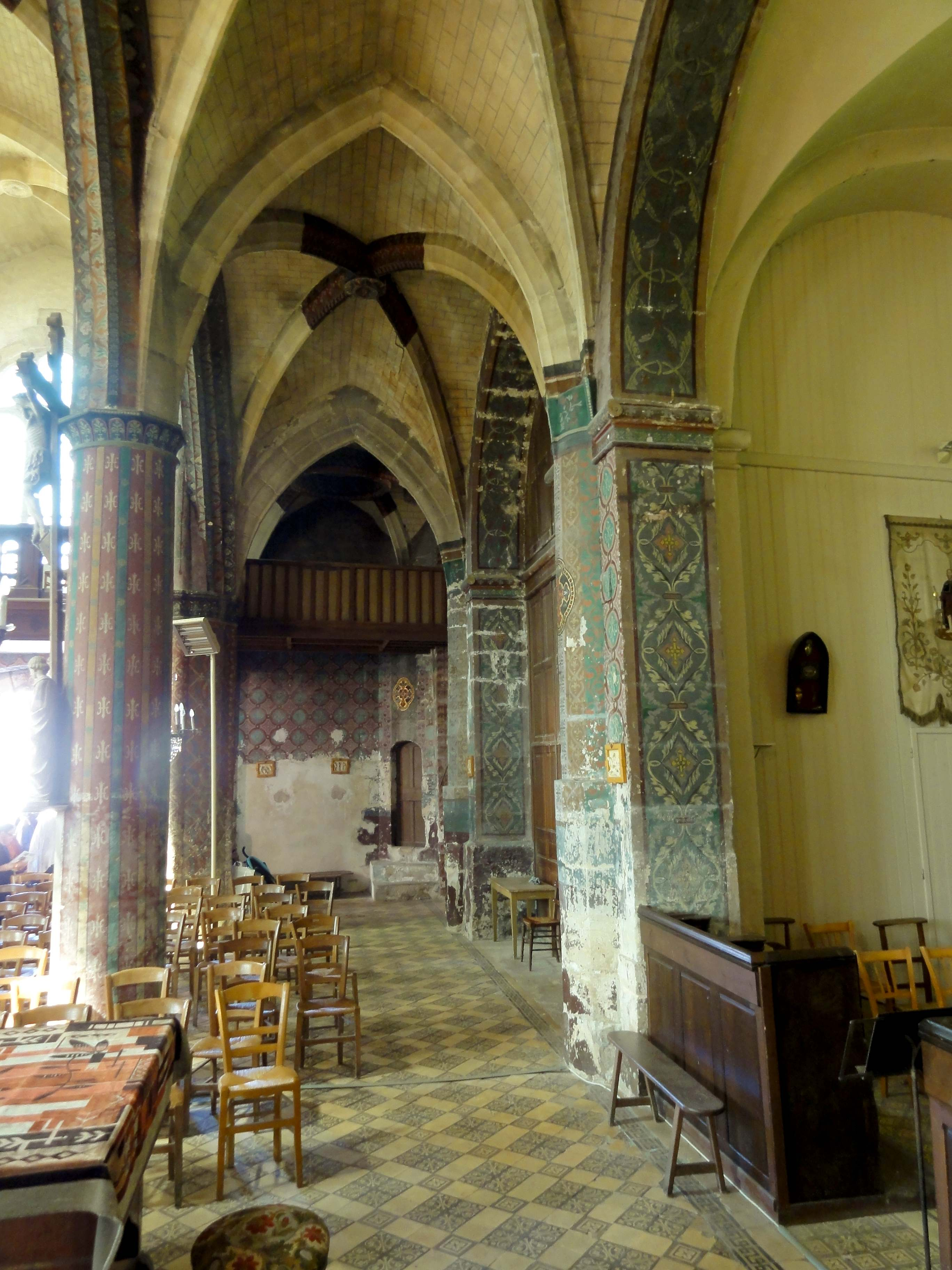 Intérieur de l'église (voir titre).